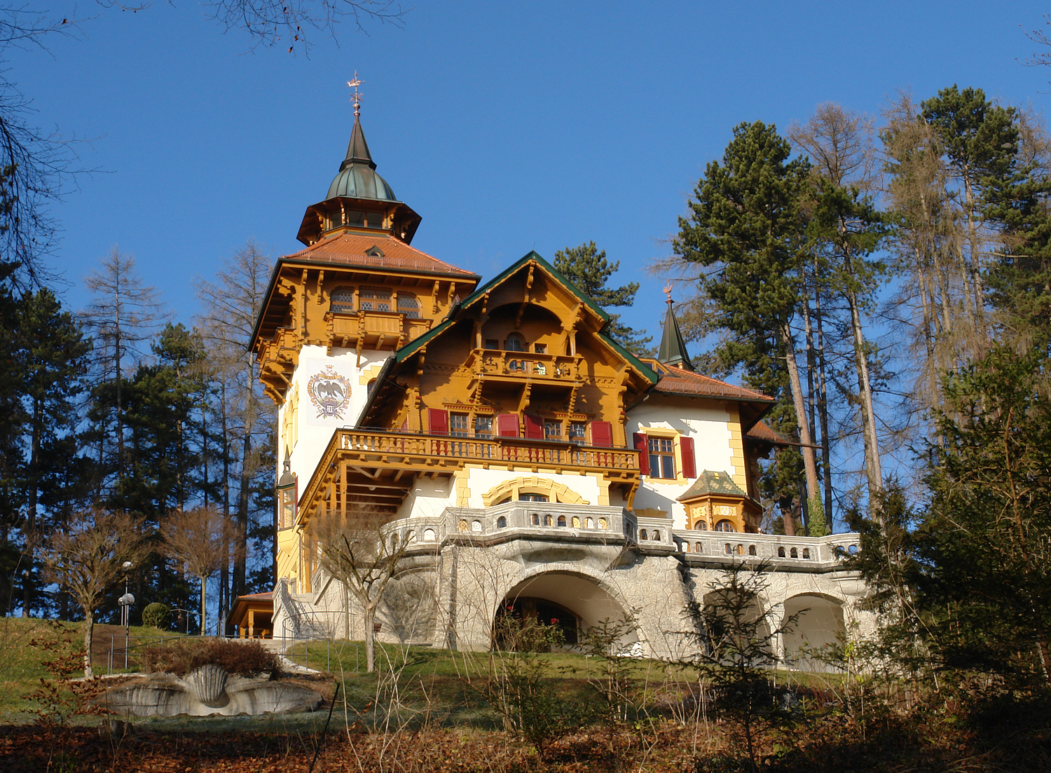 Die Villa Waldberta in Feldafing wurde 1901/02 als Teil der Höhenbergkolonie erbaut. Sie ist seit 1966 durch eine private Stiftung im Besitz der Landeshauptstadt München und dient seit den 1980er Jahren als internationales Künstlerhaus